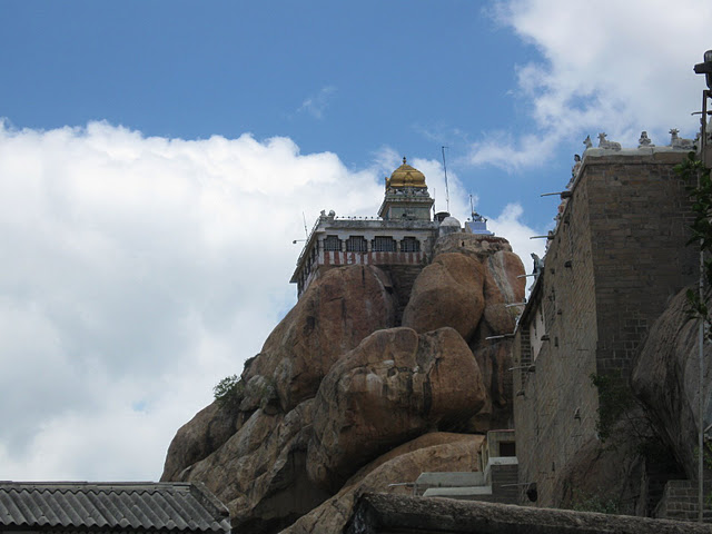 திருச்சிக்குப் புகழ்சேர்க்கும் மலைக்கோட்டையின் ஒரு காட்சி.